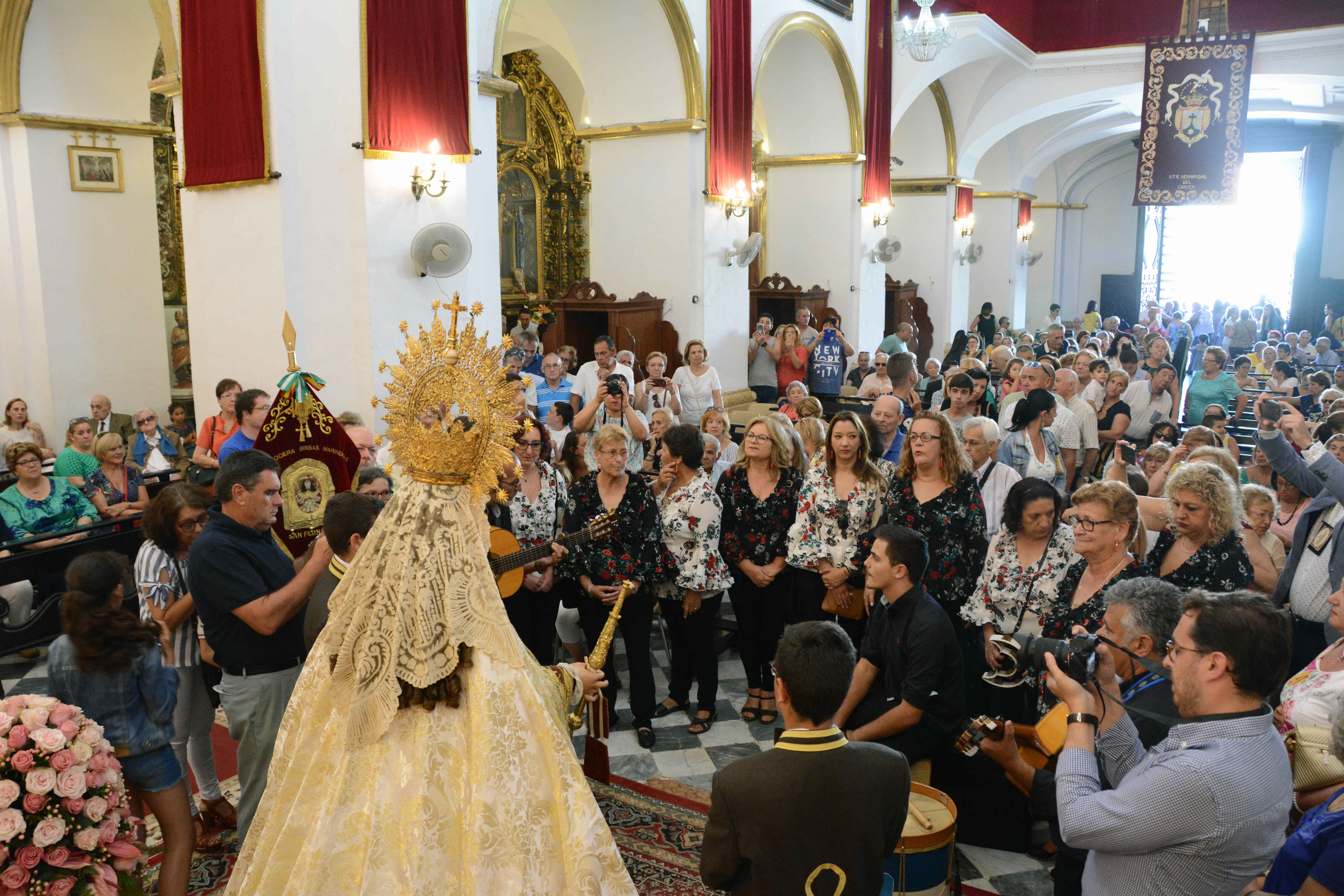 besamanos